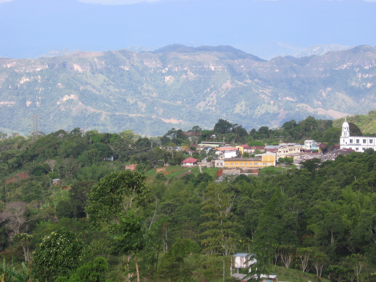 PANORAMICA DE FALAN desde la finca el mirador